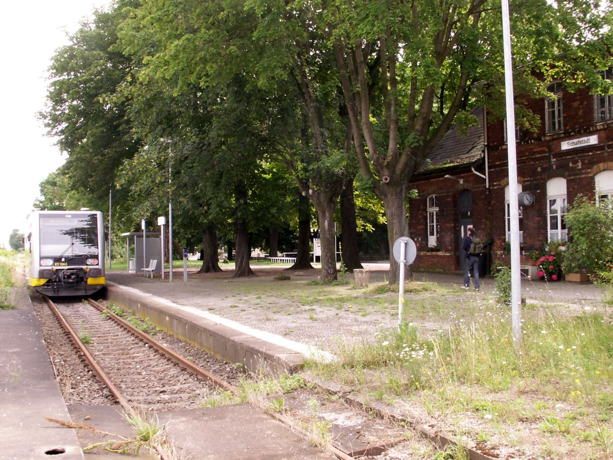 Bahnstrecken um Merseburg, Bahnhof Schafstädt